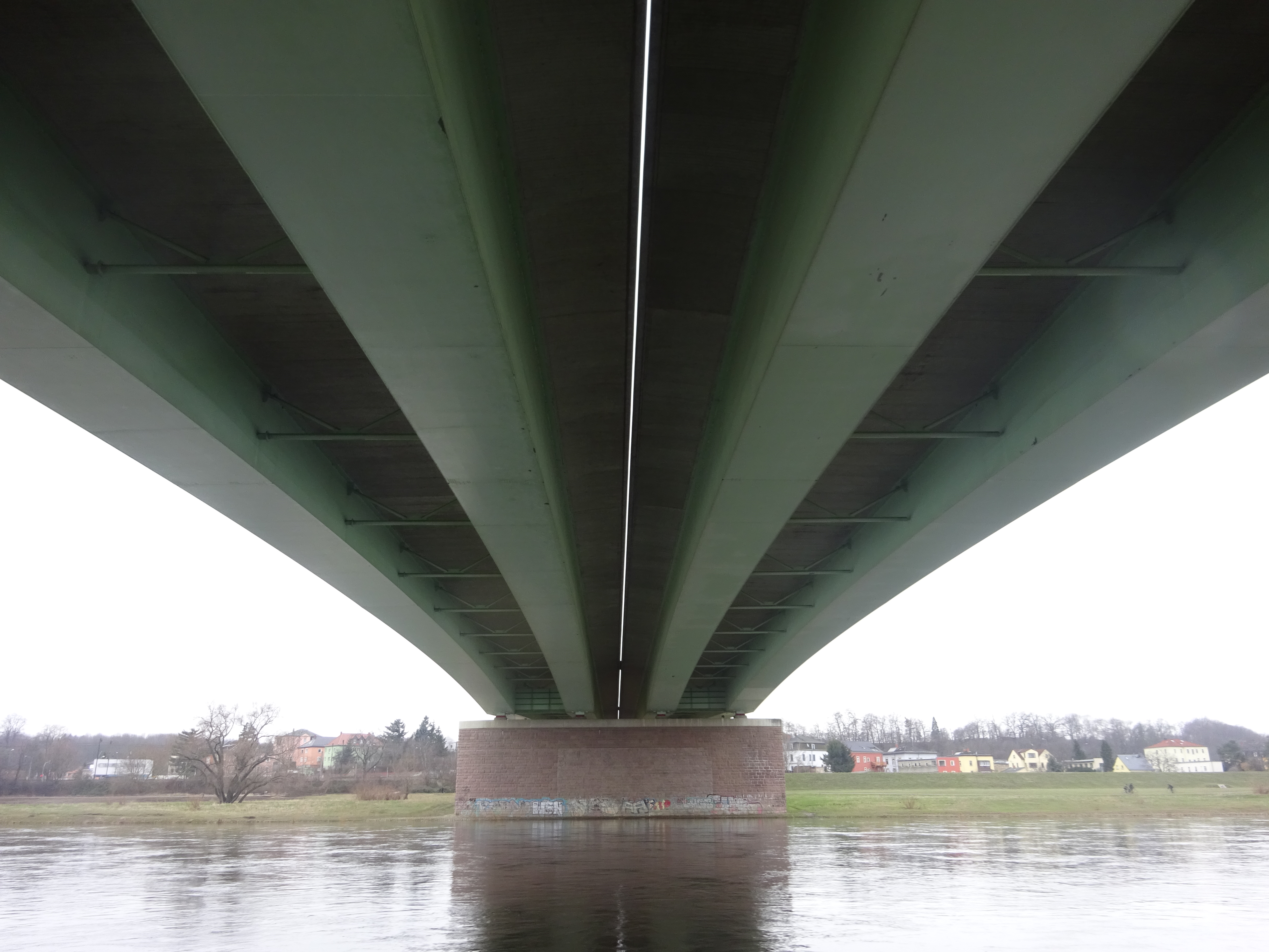 Autobahnbrücke der A4 in Dresden, Feld über die Elbe